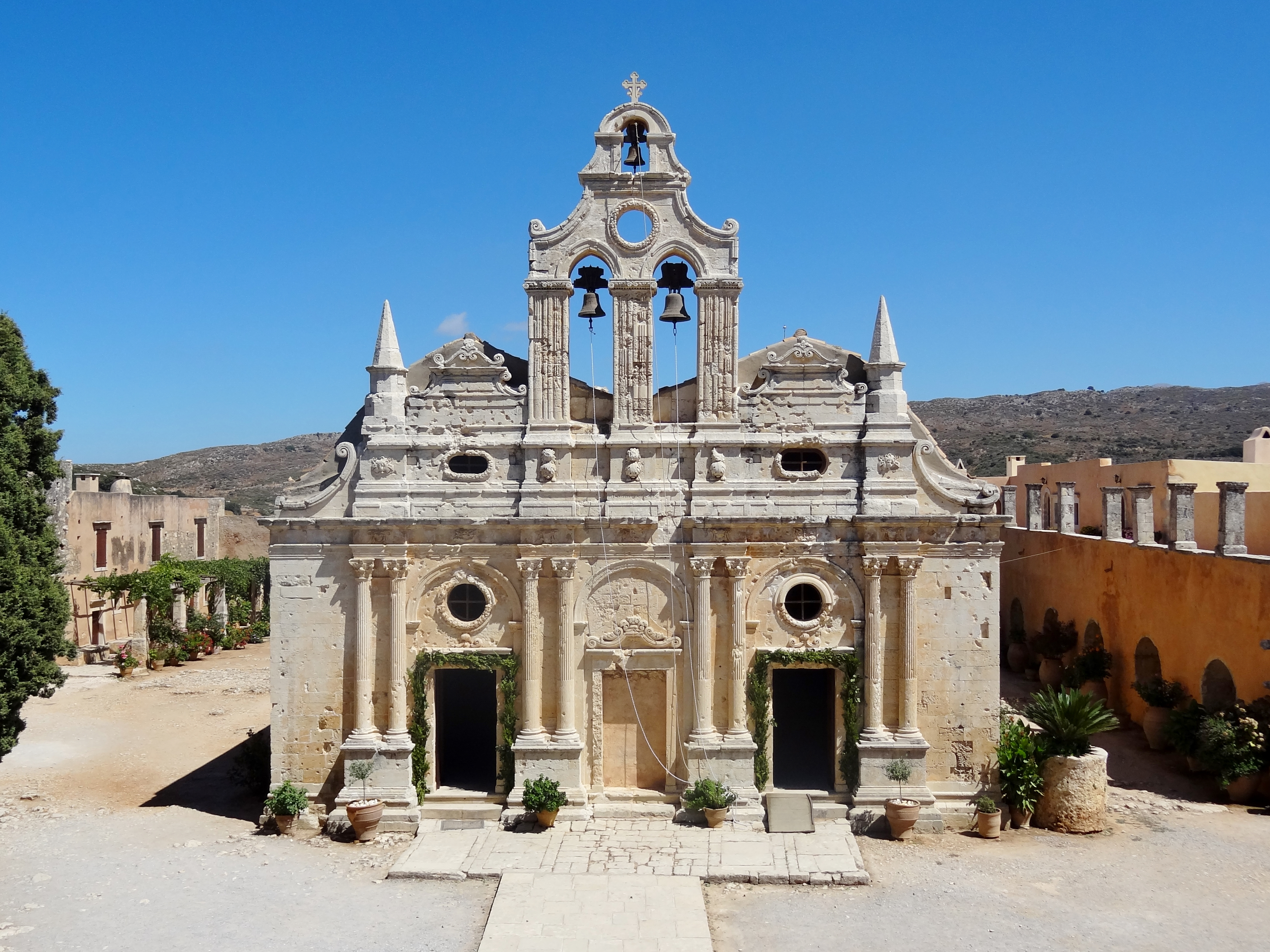 Westseite der Klosterkirche im Kloster Arkadi, Gemeinde Rethymno, Regionalbezirk Rethymno, Kreta, Griechenland